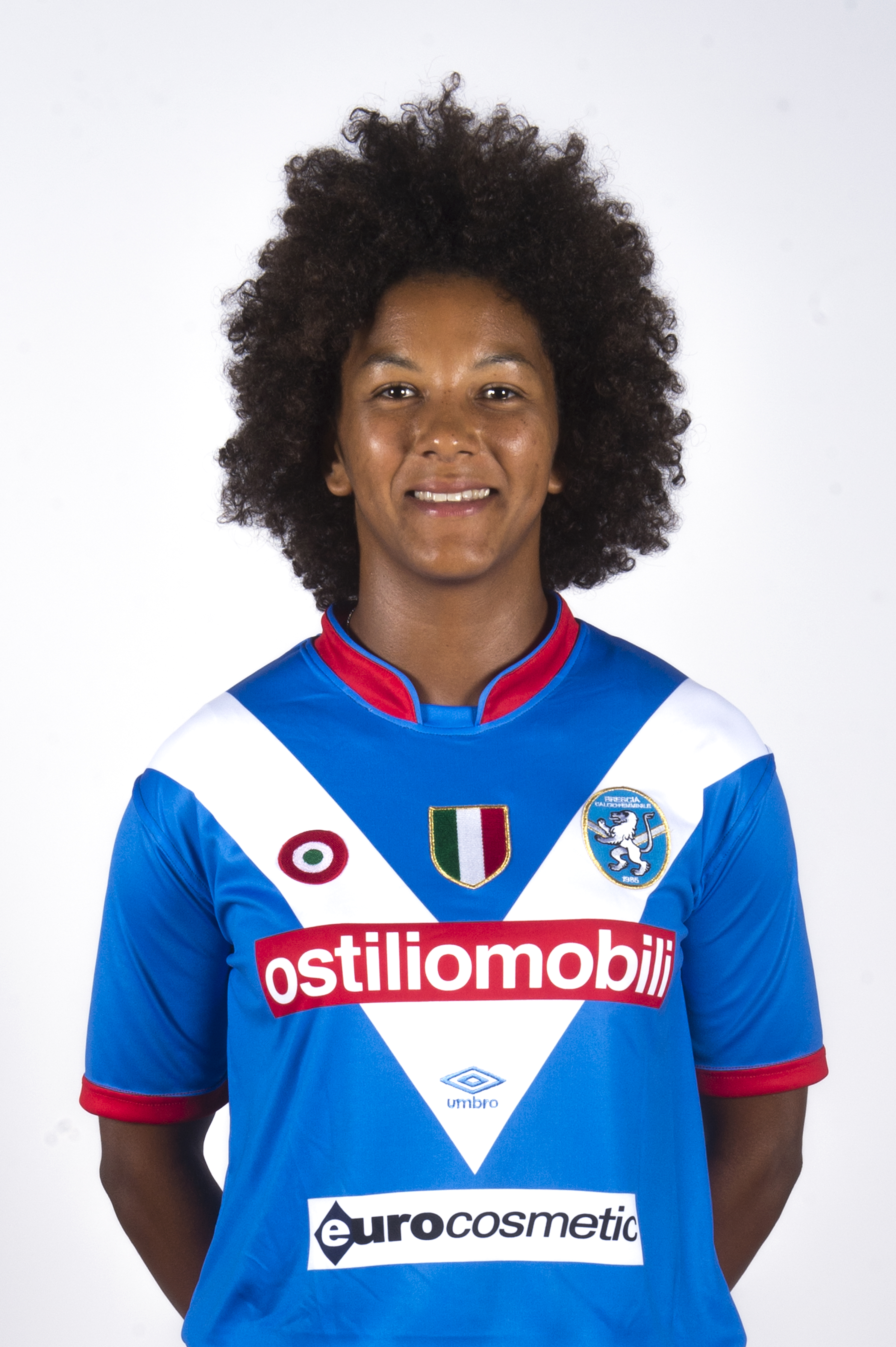 Sara Gama, difensore, foto ufficiale Brescia Calcio Femminile stagione 2016-2017.